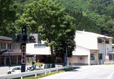 長野県製薬株式会社の外観